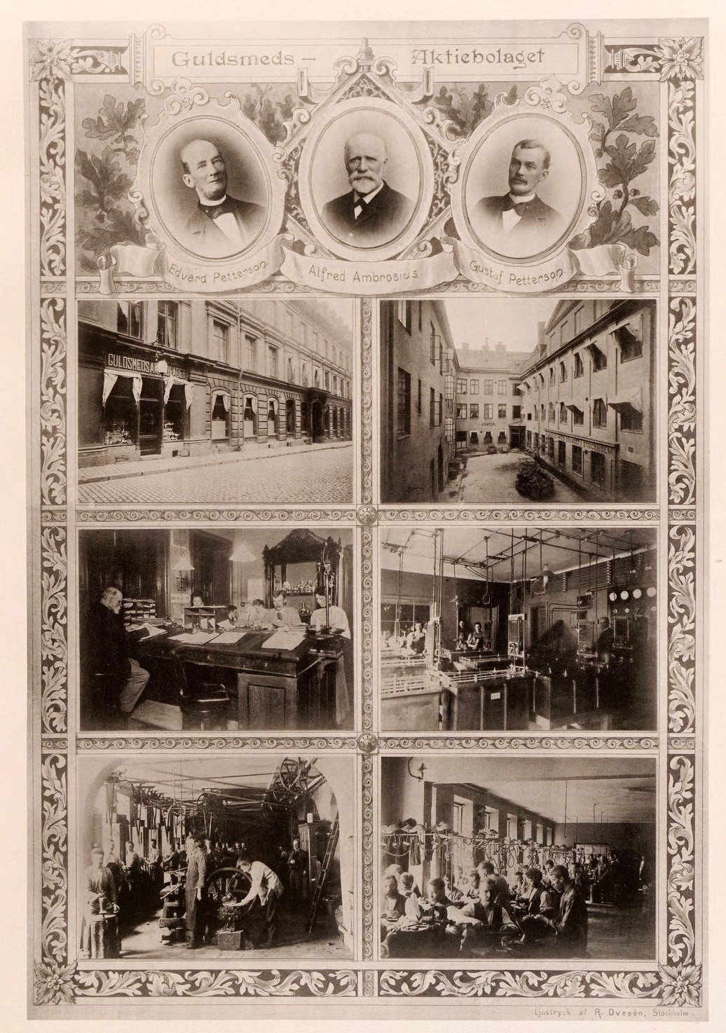 Guldsmedsaktiebolaget